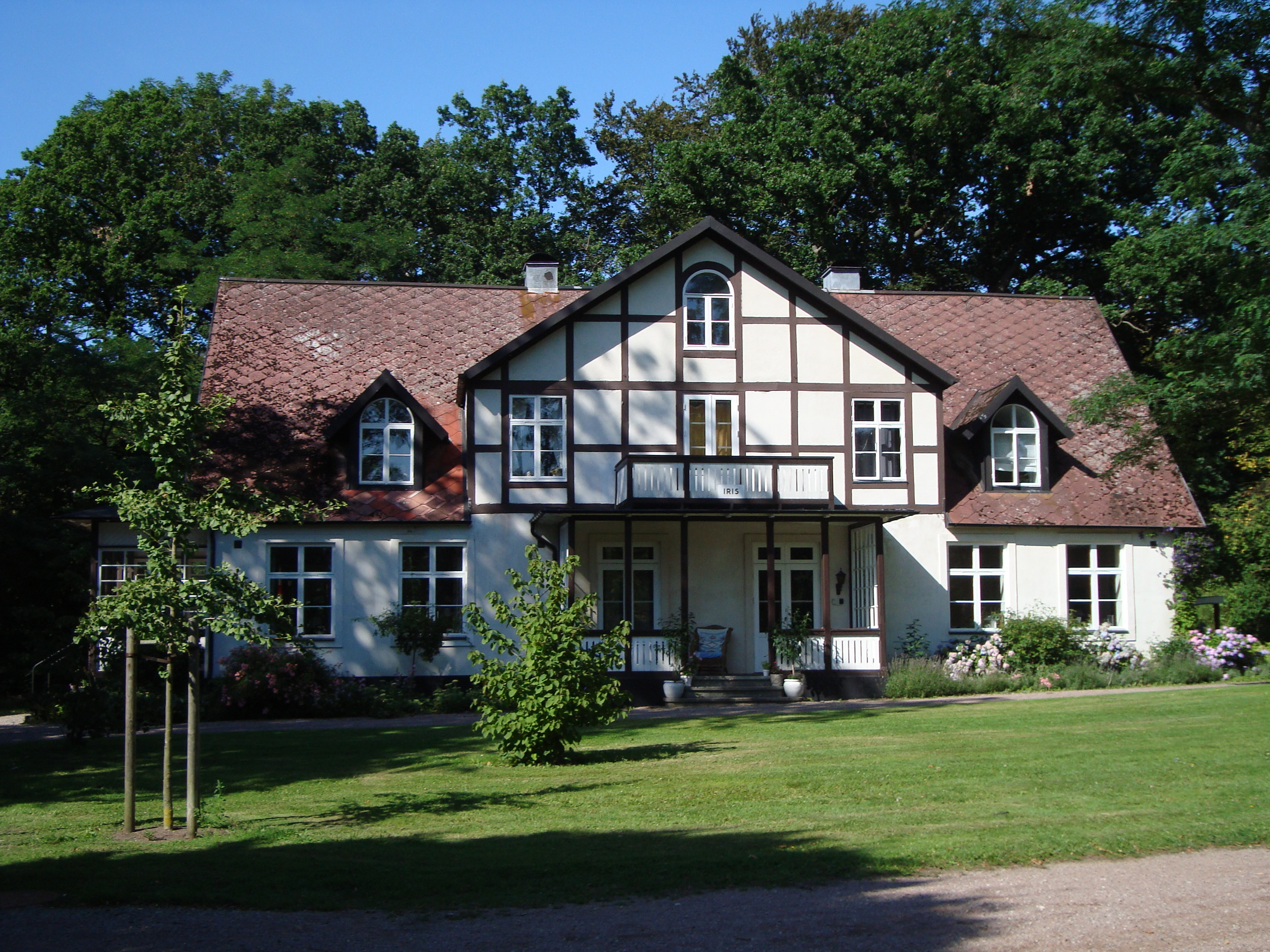 Villa Iris i Ramlösa brunnspark i Helsingborg.